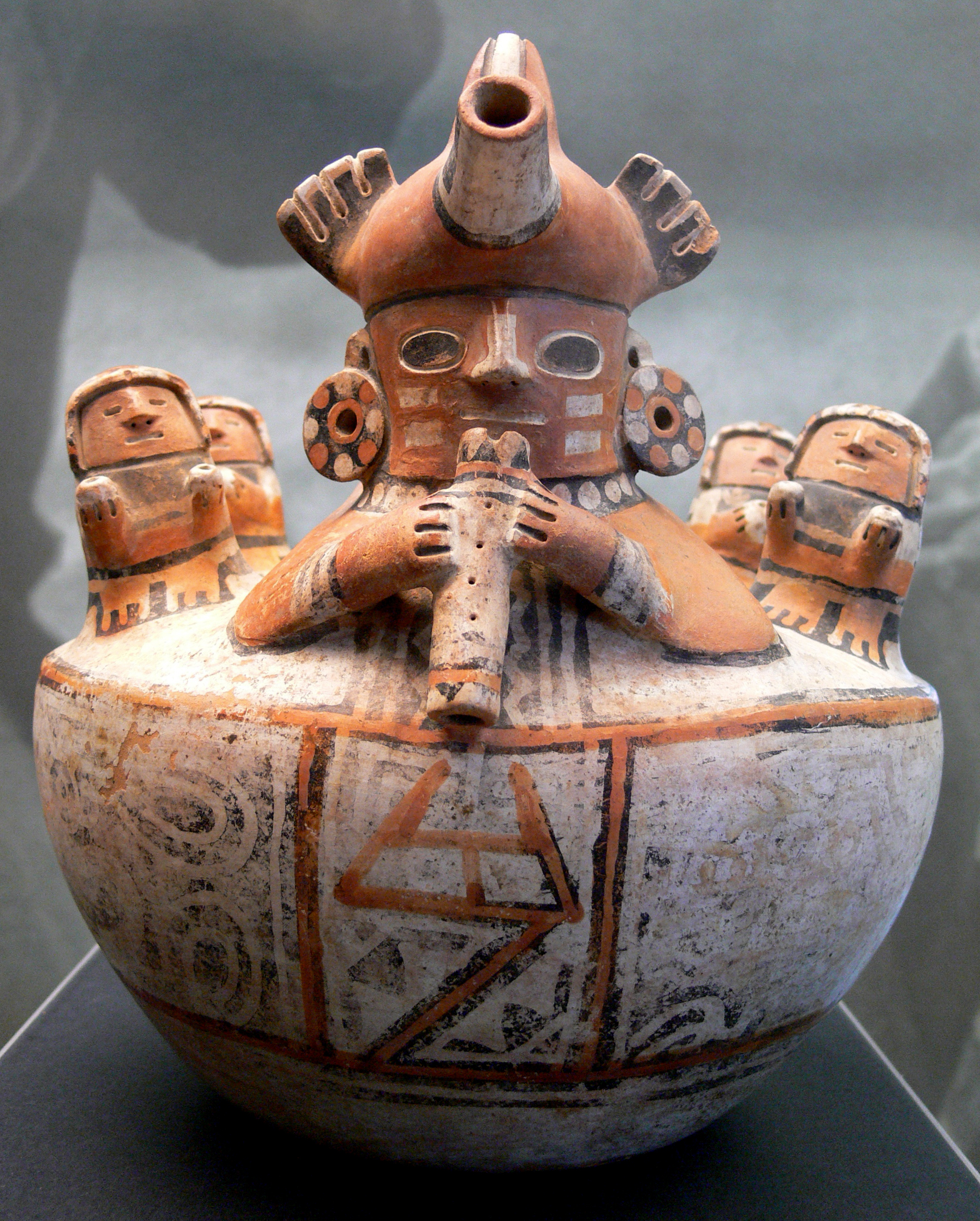 Schaffhausen, Museum zu Allerheiligen, Sammlung Ebnöther (Abteilung "Musik/Tanz") Gefäss mit Musikszene, Ton, modelliert, geritzt und bemalt; Höhe 21,5 cm; Peru, nördliche Küstenregion, Recuay; 100 v. Chr.–300 n. Chr. (Katalog 1999, S. 235)